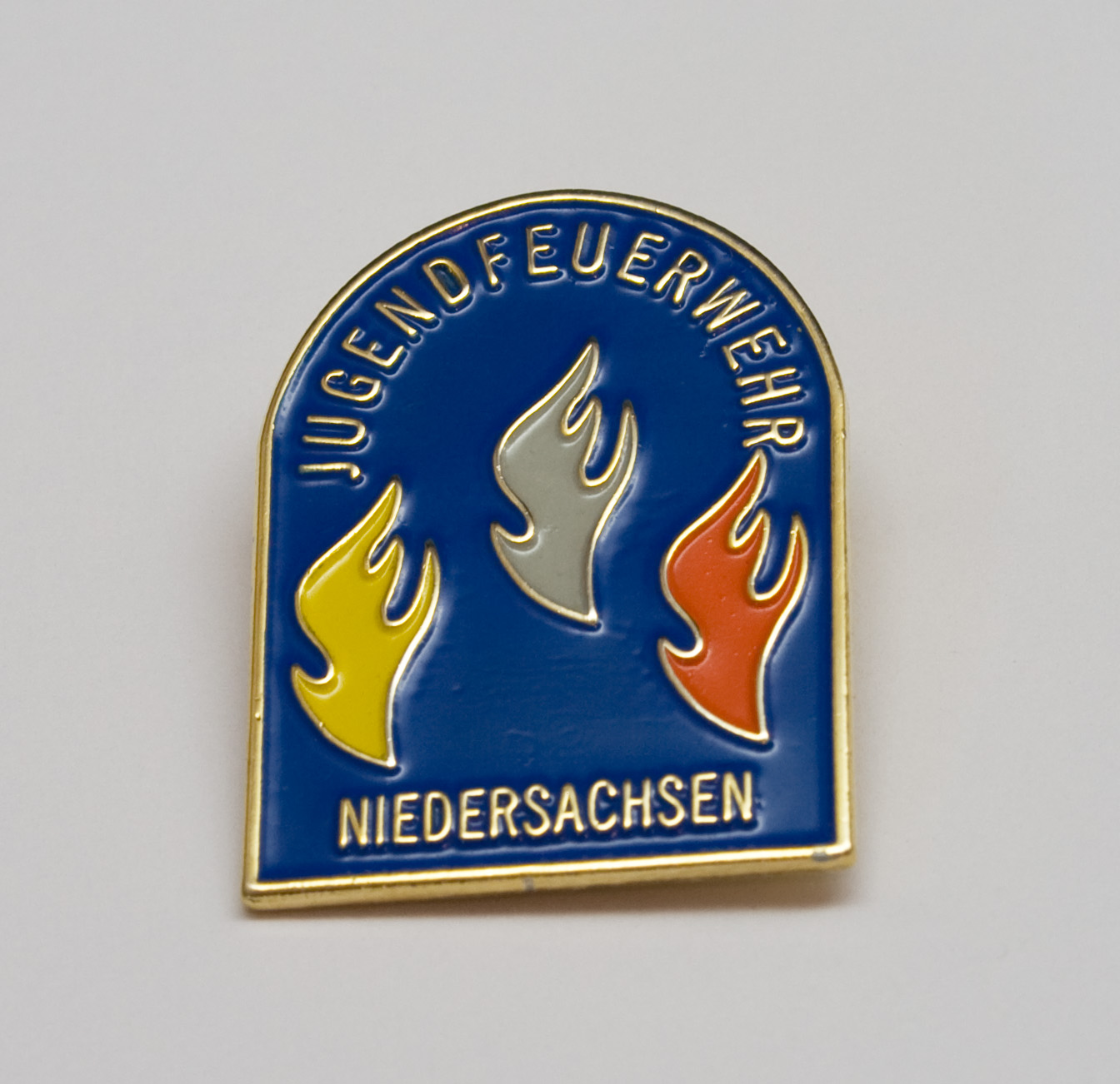 Jugenflamme Stufe2 aus Niedersachsen